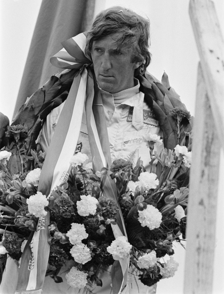 Grand Prix 1970 van Nederland voor Formule I wagens , Zandvoort; J. Rindt in krans, kop.